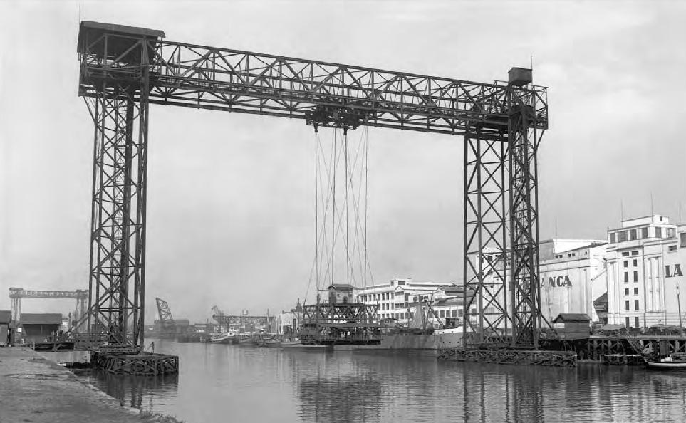 Vista del Puente Transbordador Justo José de Urquiza, que cruzaba el Riachuelo de Buenos Aires a Avellaneda a la altura de la Avenida Patricios. Fue desarmado en los años '60.Atrás asoma el viejo Frigorífico “La Blanca” y al fondo se distingue el otro transbordador luego desmantelado, el Presidente Luis Sáenz Peña, a la altura de la calle Garibaldi.